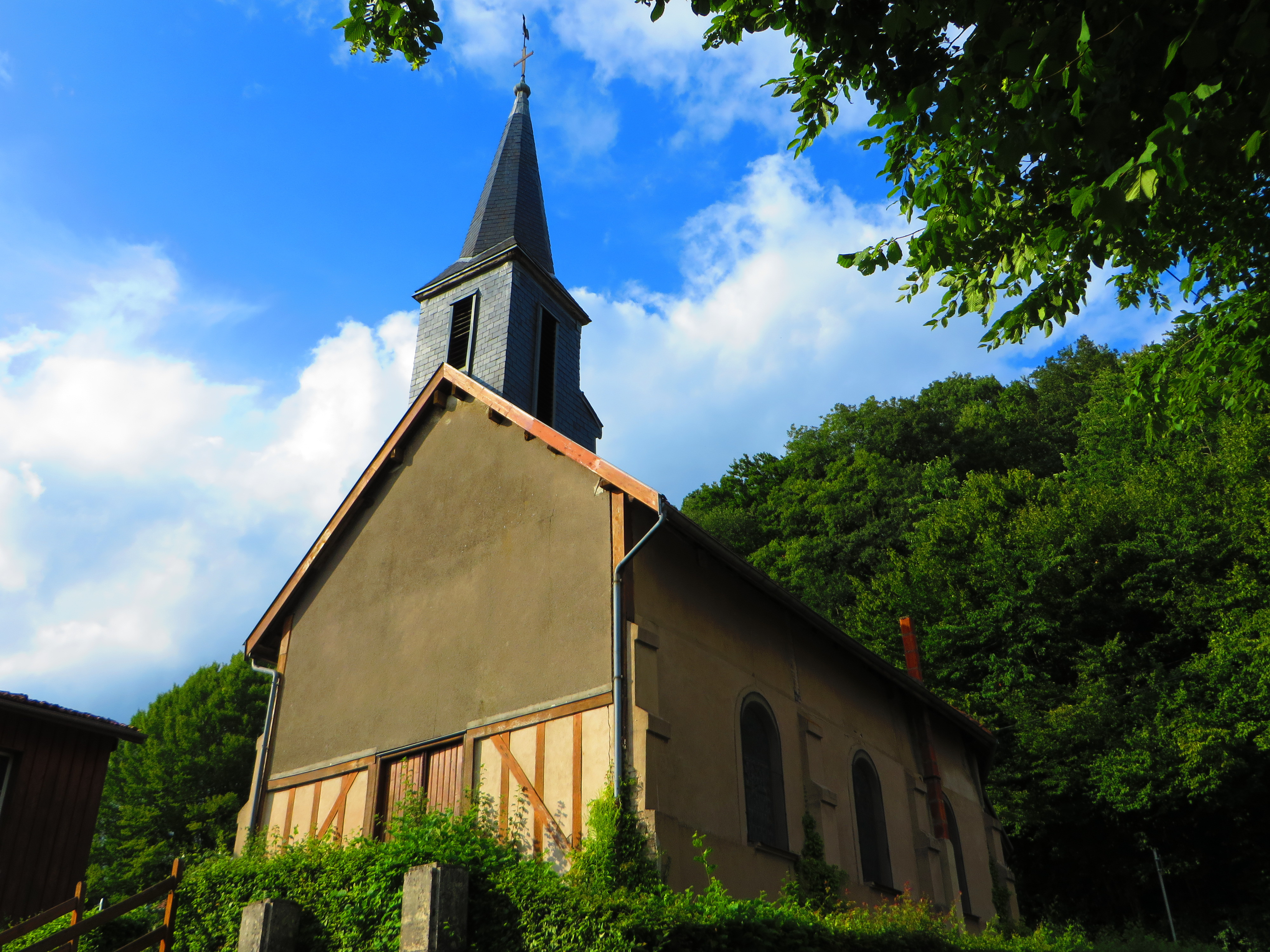 Le Claon L'église Saint-Charles